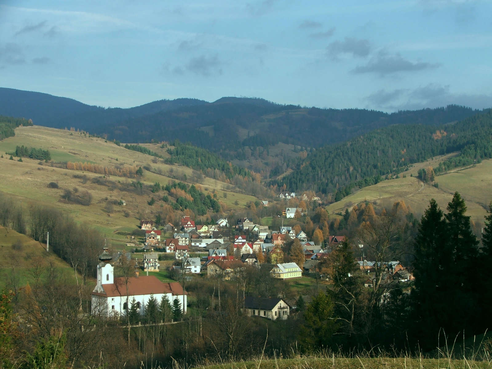 Jaworki (Małe Pieniny)